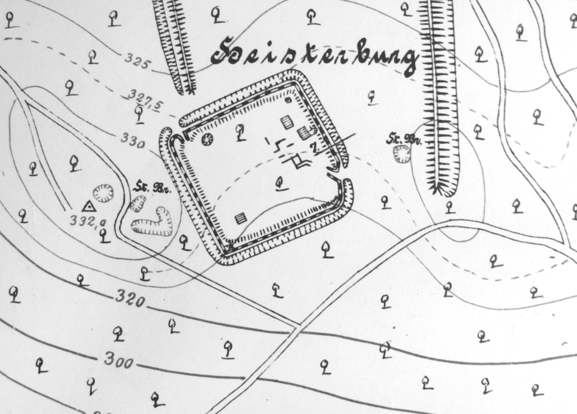 Heisterburg. Grundrissdarstellung der Hauptburg der Heisterburg von Carl Schuchhardt im 1916 erschienen Atlas vorgeschichtlicher Befestigungen, Vermessung und Aufnahme der Anlage vermutlich um 1885